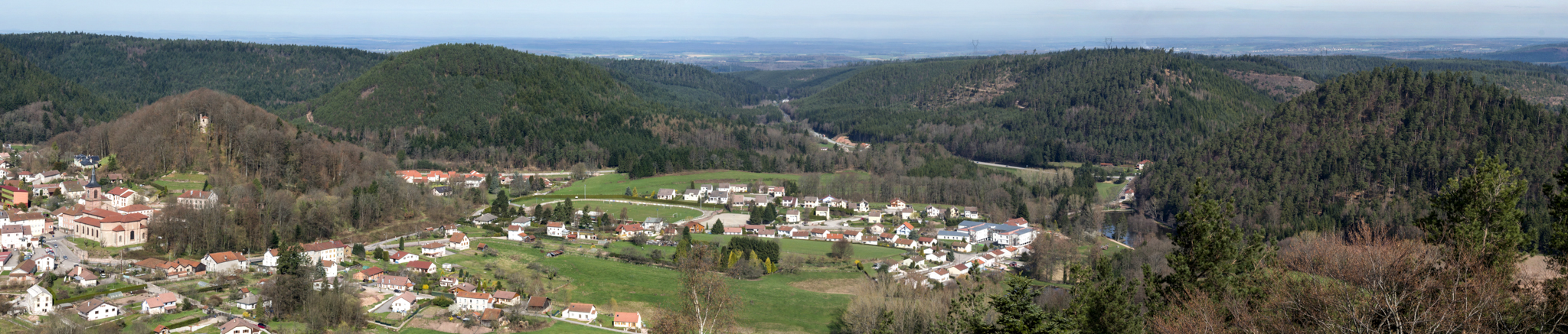 Vue générale sur Bruyères-Vosges depuis le Mirador au sommet de l'Avison. De gauche à droite, la colline du Château, le Buemont, la route de Grandvillers, la montagne de Fouchon , l'étang et la montagne de Pointhaie.